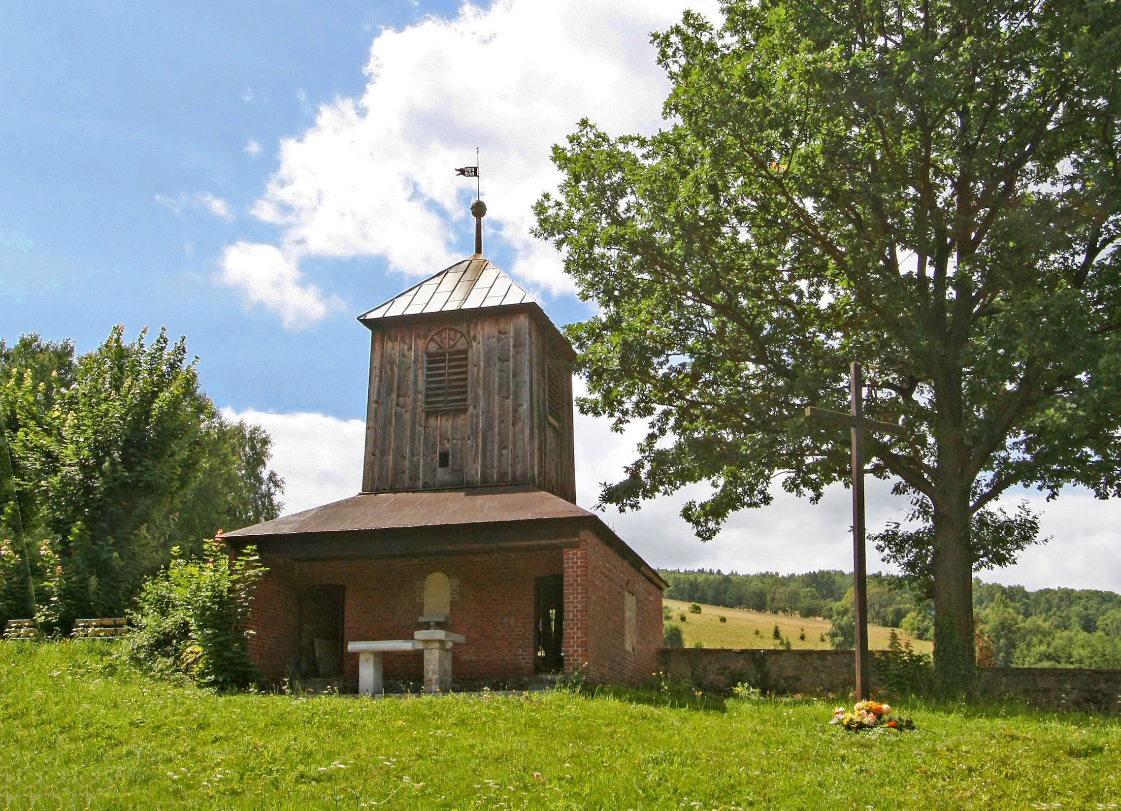 Jugowice, dzwonnica cmentarna, 1828